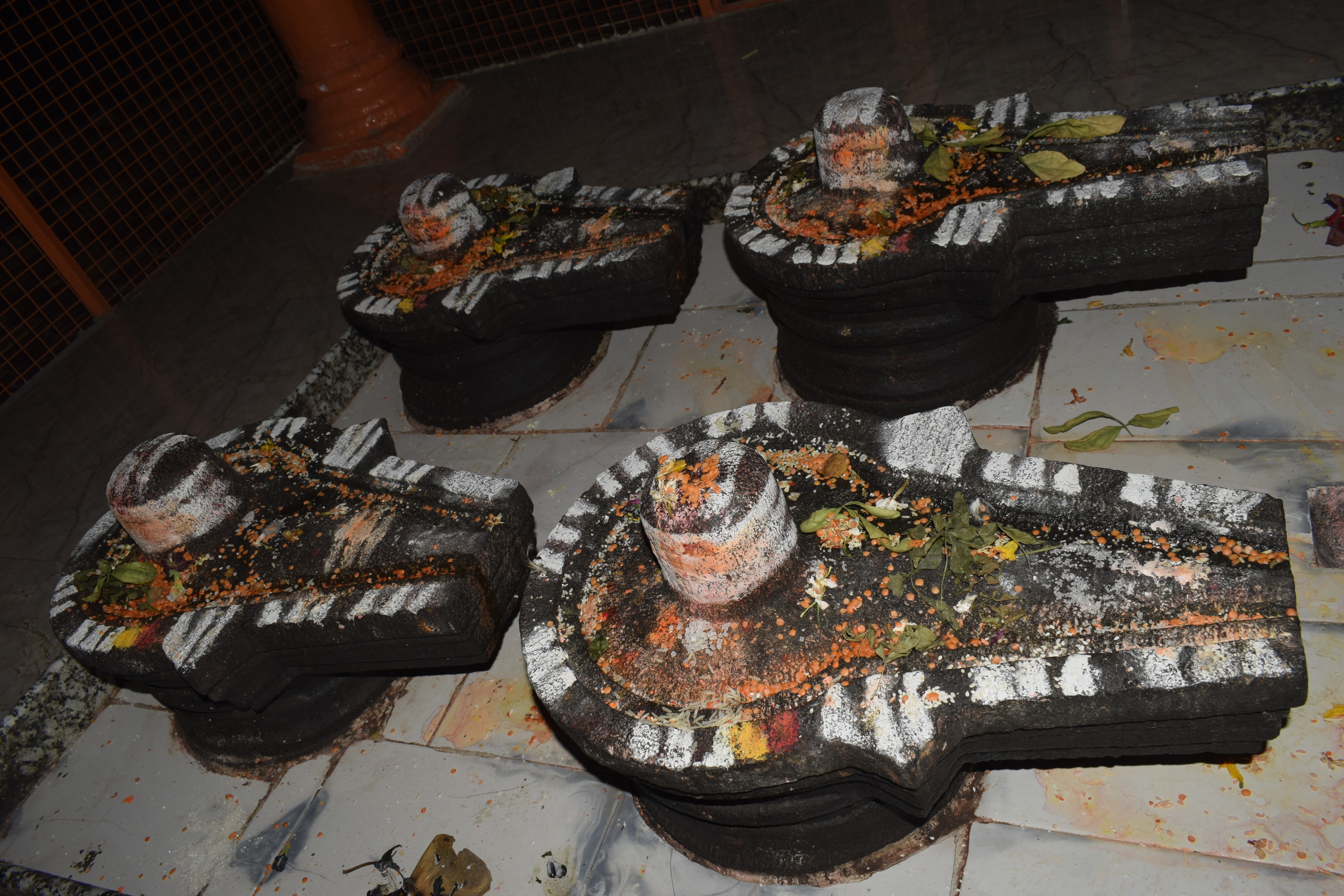 श्री रामभद्रेश्वर लिंग